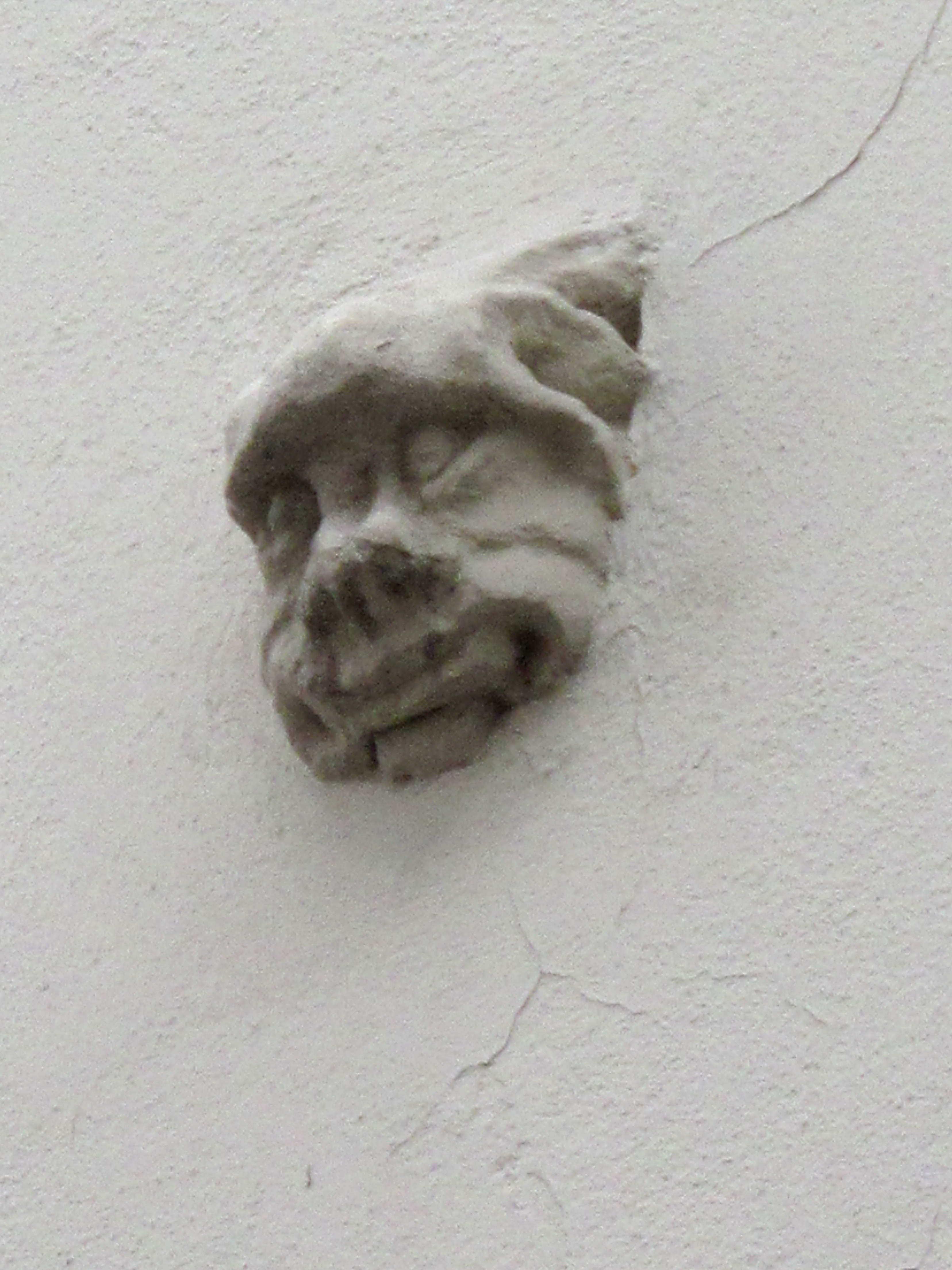 Brno začátkem roku 2010